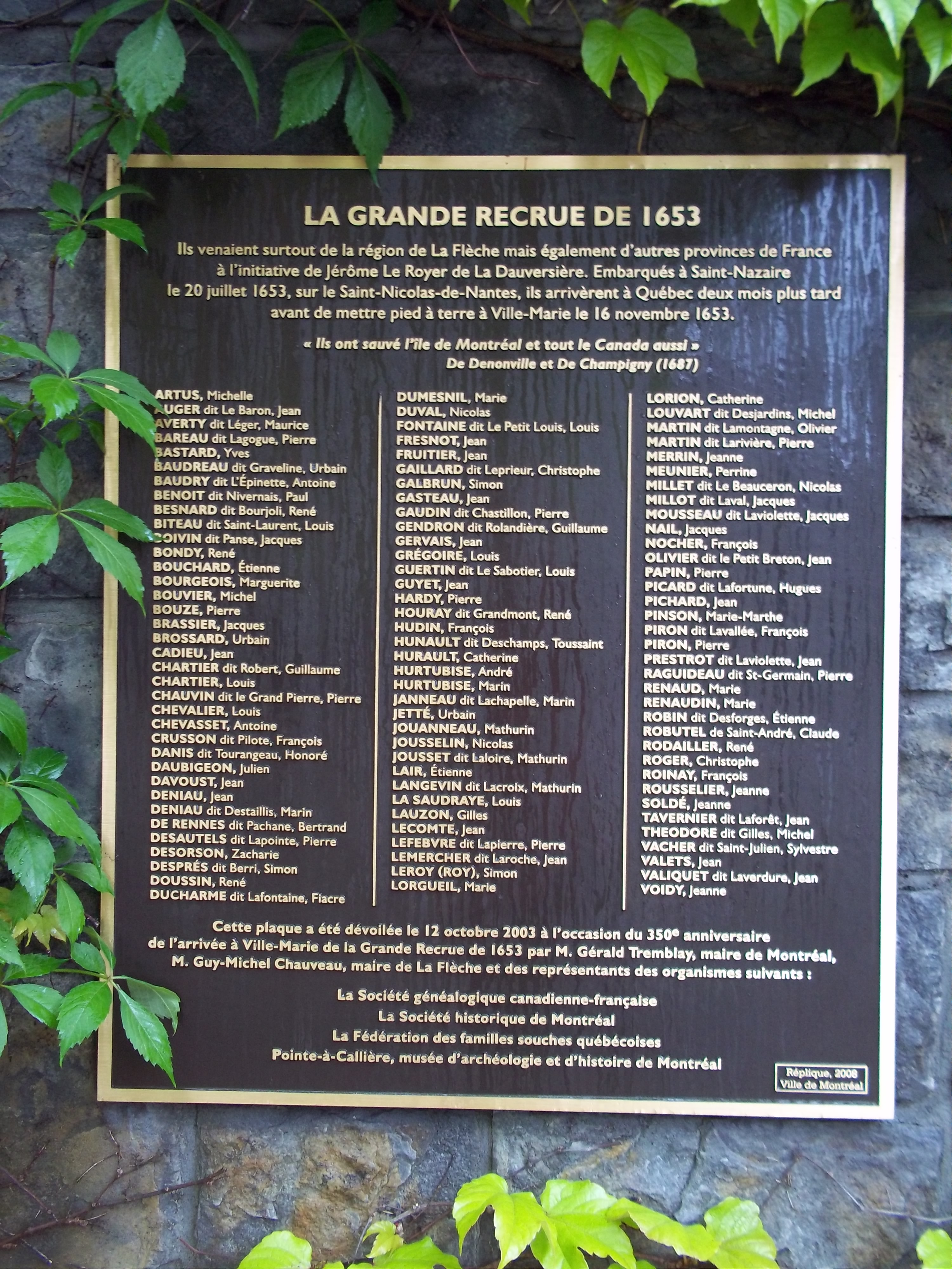 La Grande Recrue de 1653, plaque posée à la Place de La Dauversière à Montréal, liste de noms de colons français arrivés en 1653.